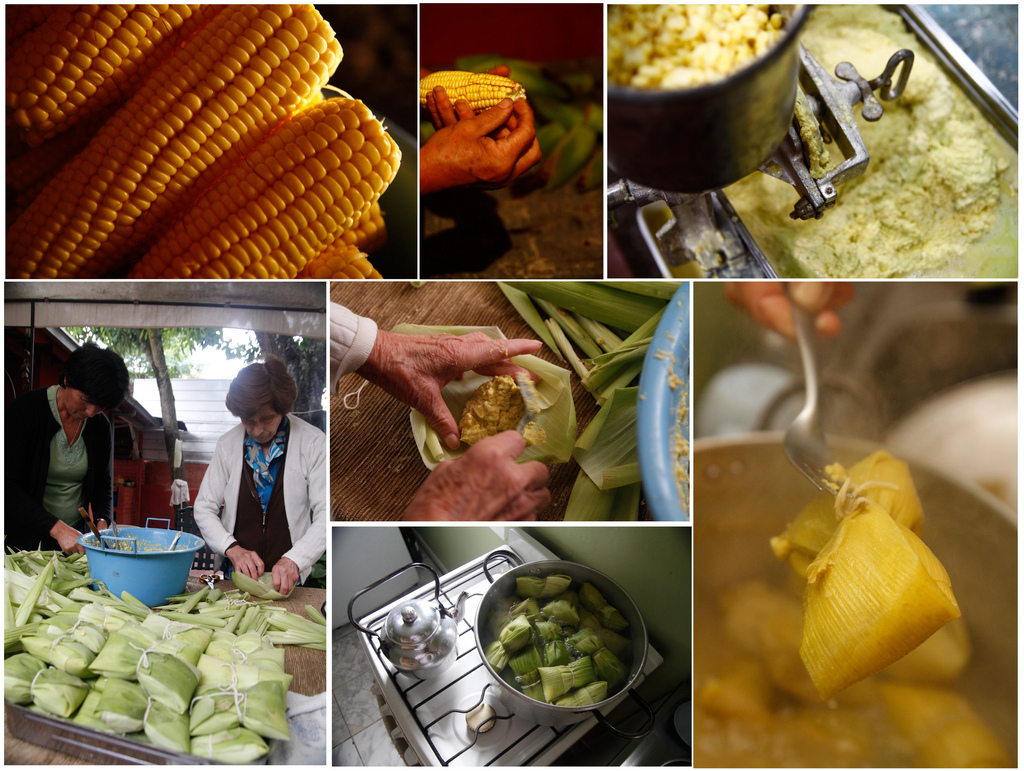 Preparación en Chile de "Humitas". Las humitas o humintas (del quechua: jumint'a) son un alimento de origen andino, Bolivia, Argentina, Chile, Ecuador y el Perú. Consiste básicamente en una pasta de masa de maíz cocido y levemente aliñada de aceite, envuelta y finalmente tostada en las propias hojas de la mazorca.